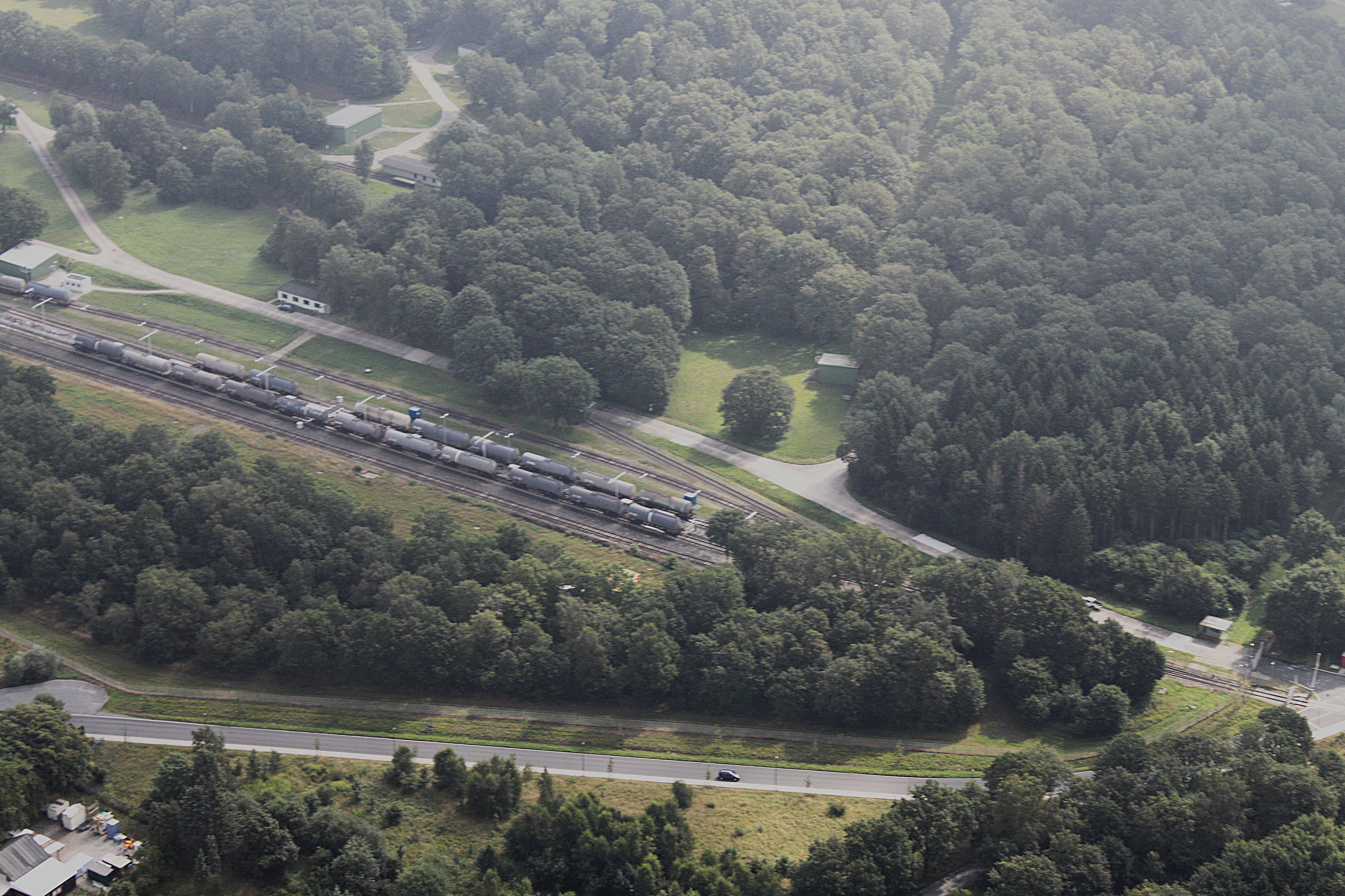 Fotoflug Bremen; Flughöhe 500 m; Tanklager Farge, Verladebahnhof I, gesehen aus westlicher Richtung (Helligkeit und Kontrast justiert)